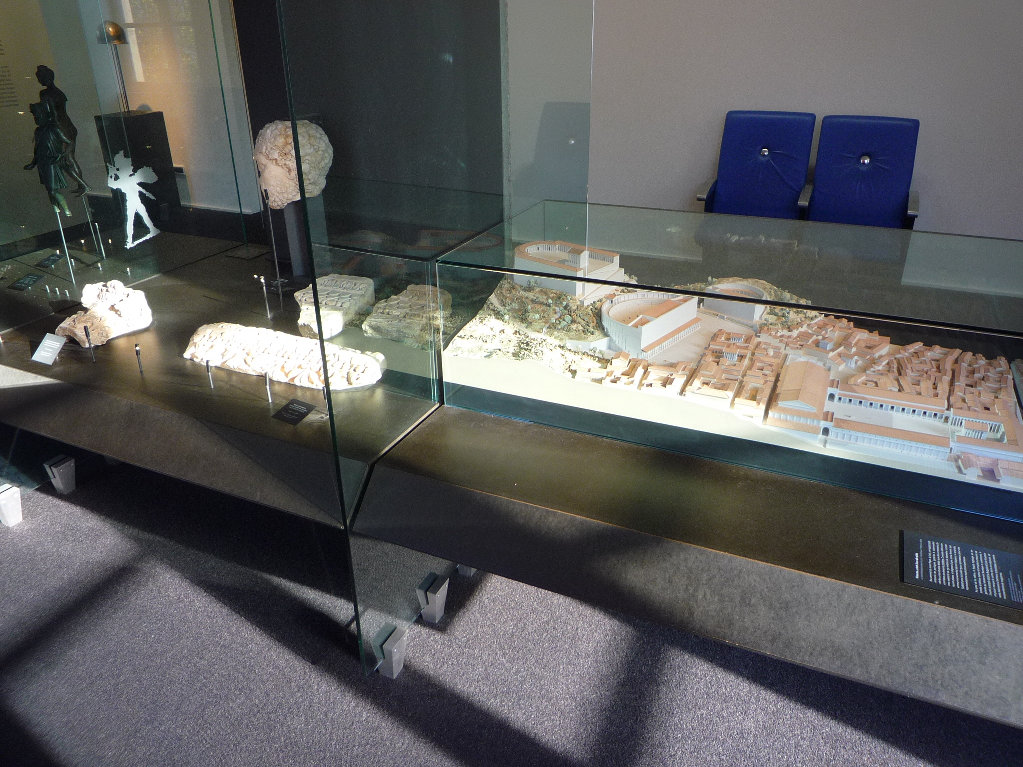 Salle gallo-romaine et sa maquette de la cité de Vienne. Musée de l'ancien évêché, Grenoble.